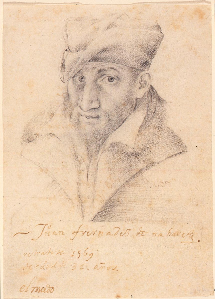 Portrait of Juan Fernández de Navarrete, so-called El Mudolabel QS:Les,"Retrato de Juan Fernández de Navarrete, el Mudo" label QS:Len,"Portrait of Juan Fernández de Navarrete, so-called El Mudo"